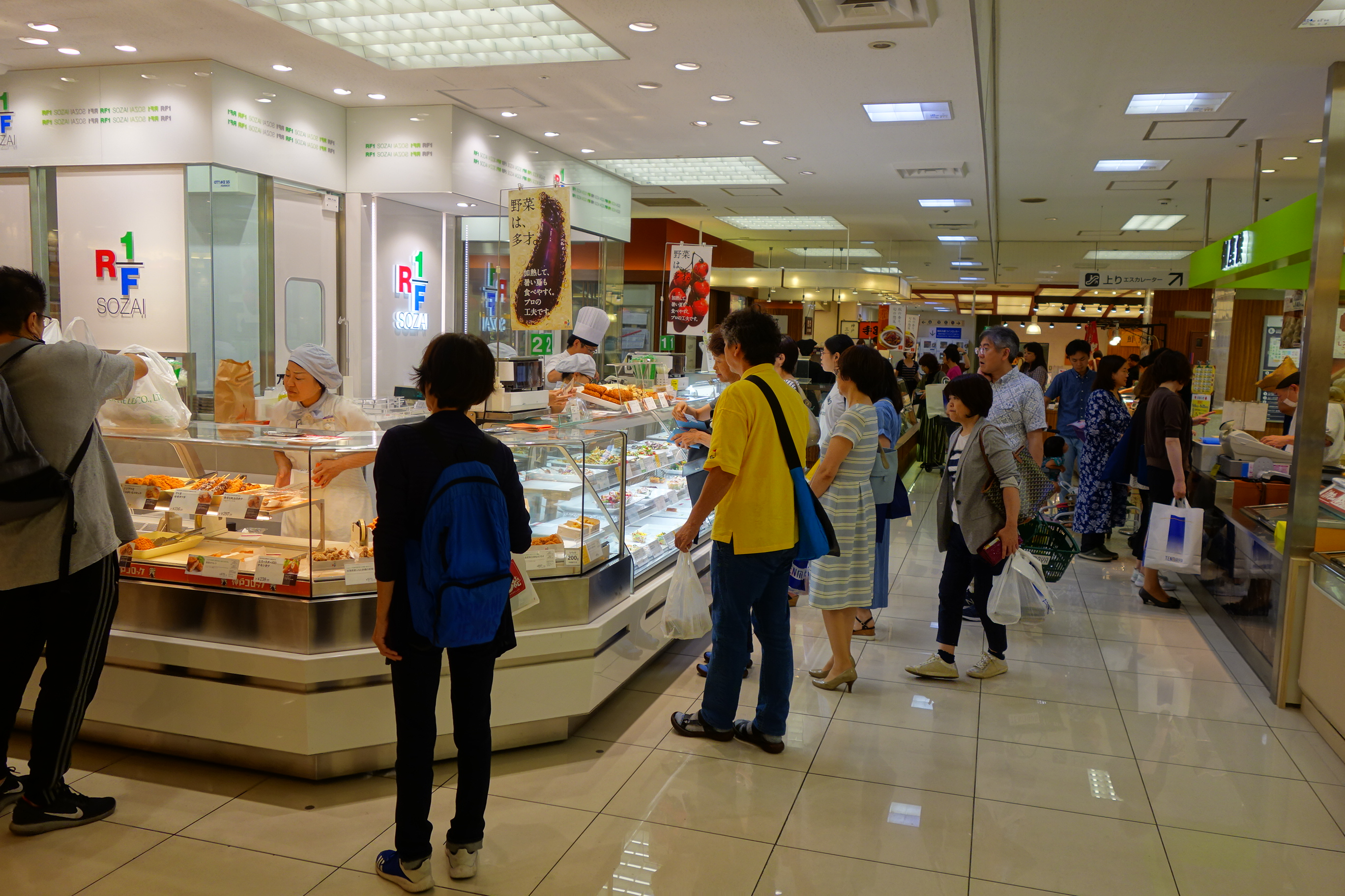 天満屋福山屋地下一階食品売り場